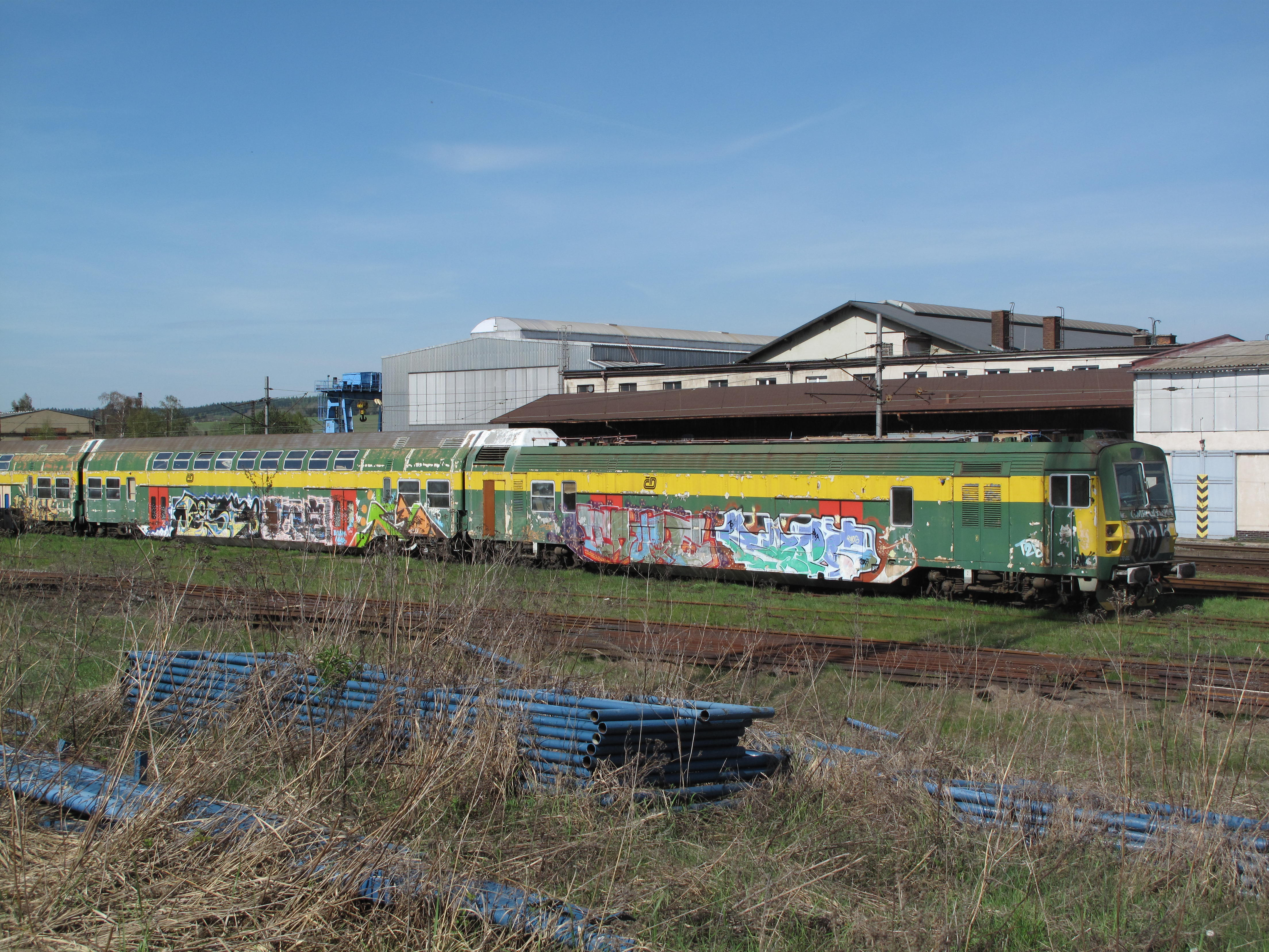 Jednotka 470 v České Třebové